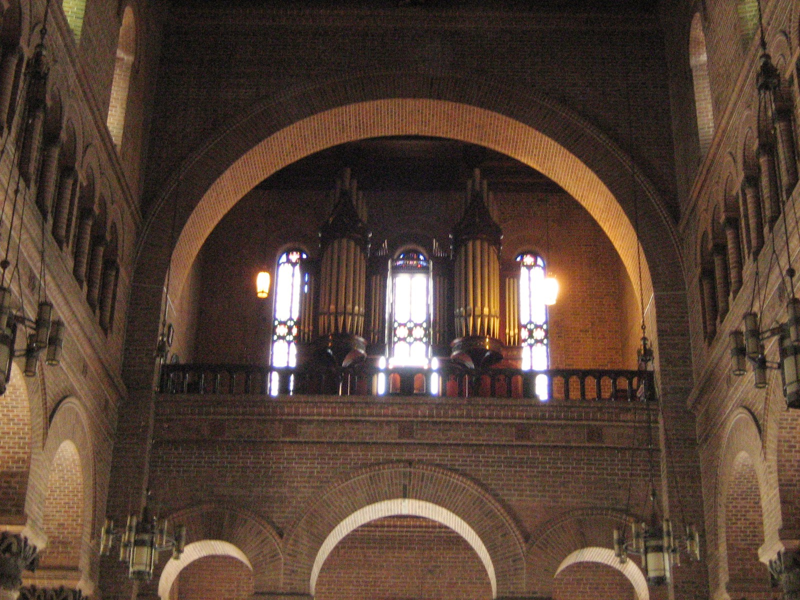 Órgano marca E.F. Walcker & Cie. de la Catedral Metropolitana de Medellín, Colombia